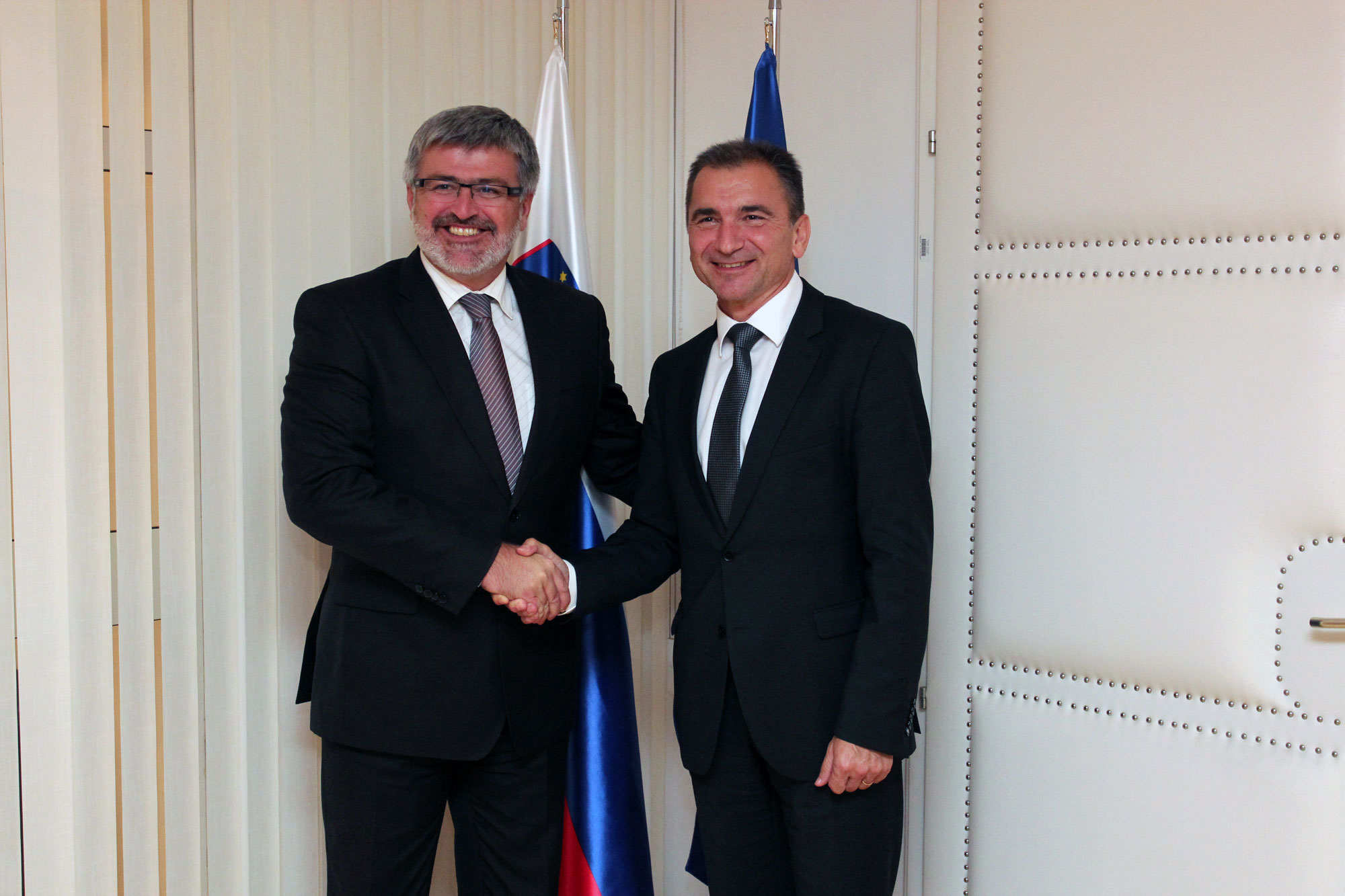 Minister za obrambo Janko Veber prevzel posle od svojega predhodnika Romana Jakiča.